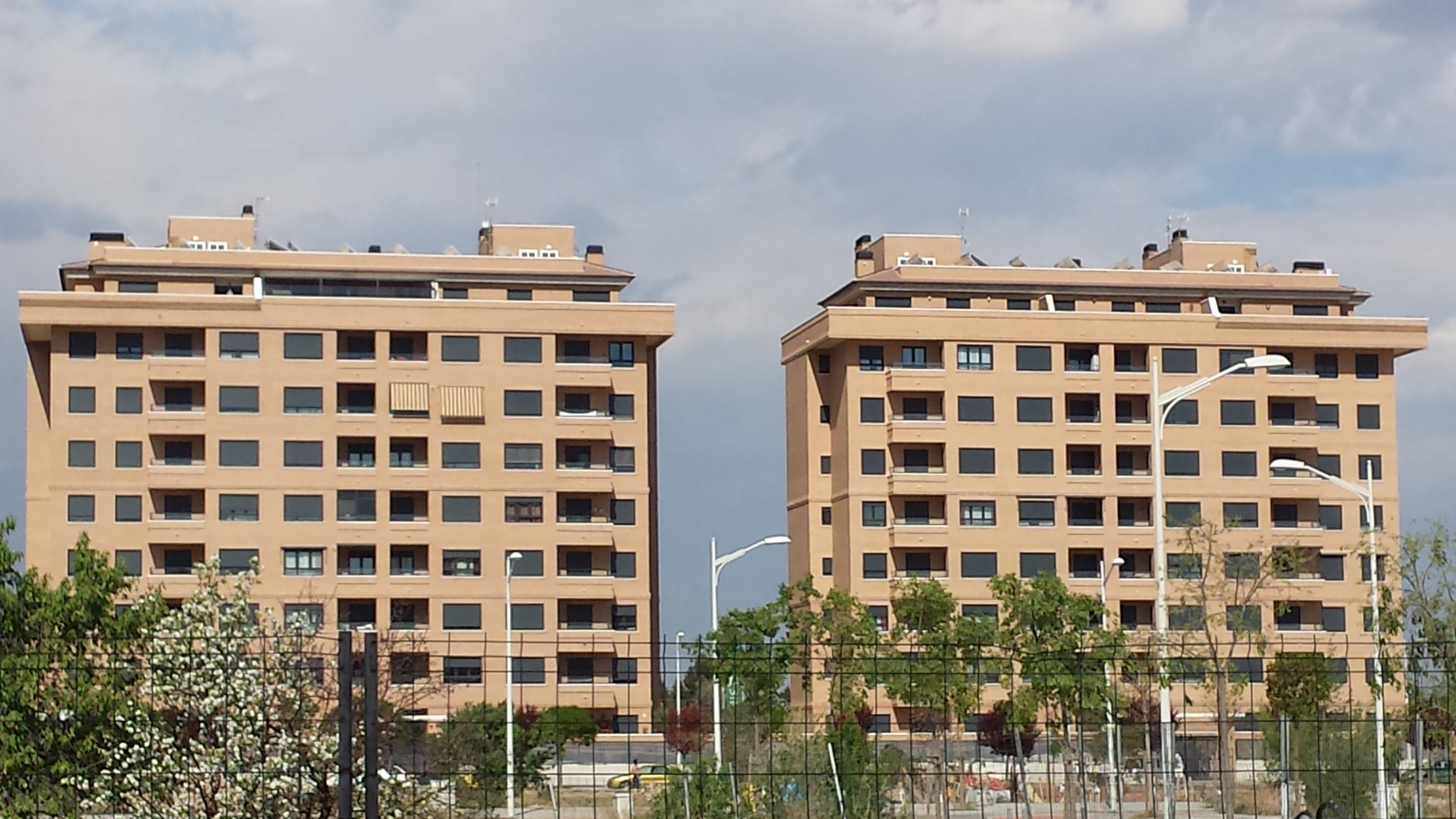 Nuevos Edificios Barrio Nuestra Señora de Cubas Albacete